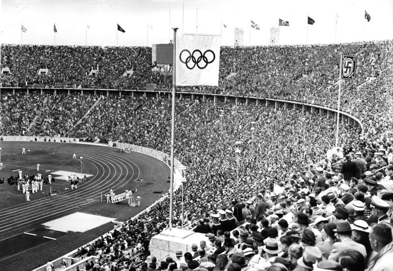 Berlin Olympiade 1936